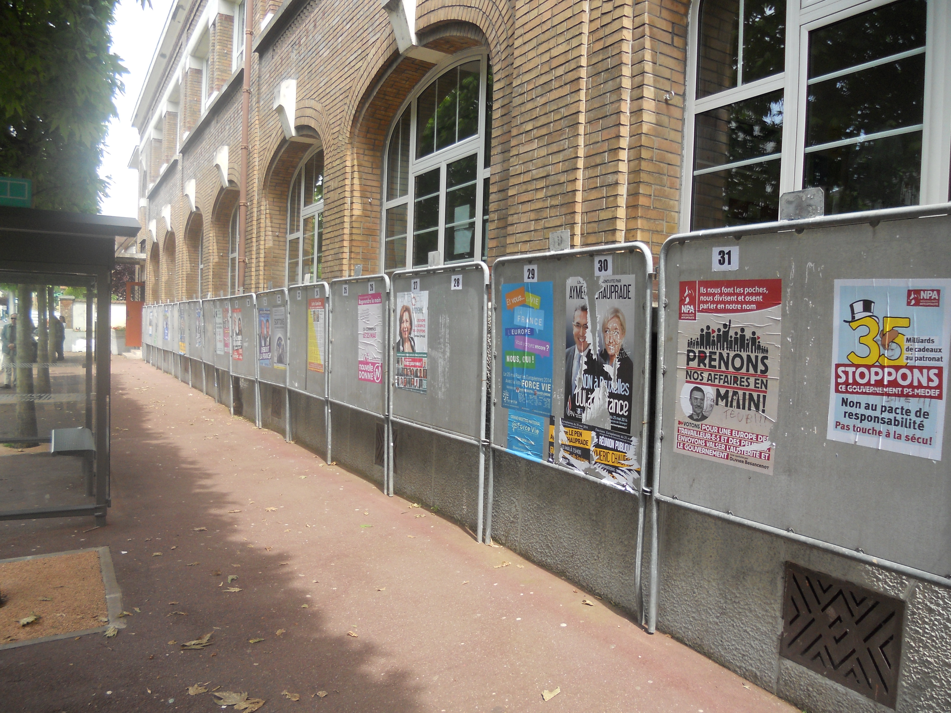 Photographie prise le 25 mai 2014 devant un bureau de vote à Bry-sur-Marne, dans la circonscription Île-de-France pour les élections européennes.